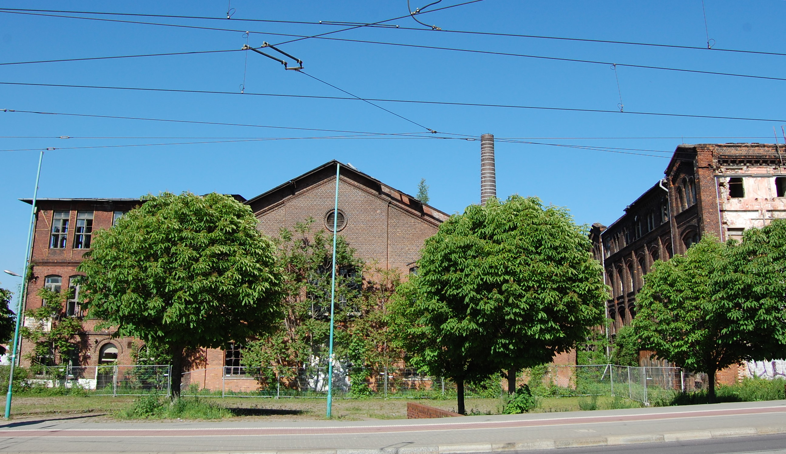 Gebäude der ehemaligen Maschinenfabrik Buckau, Blick von der Schönebecker Straße